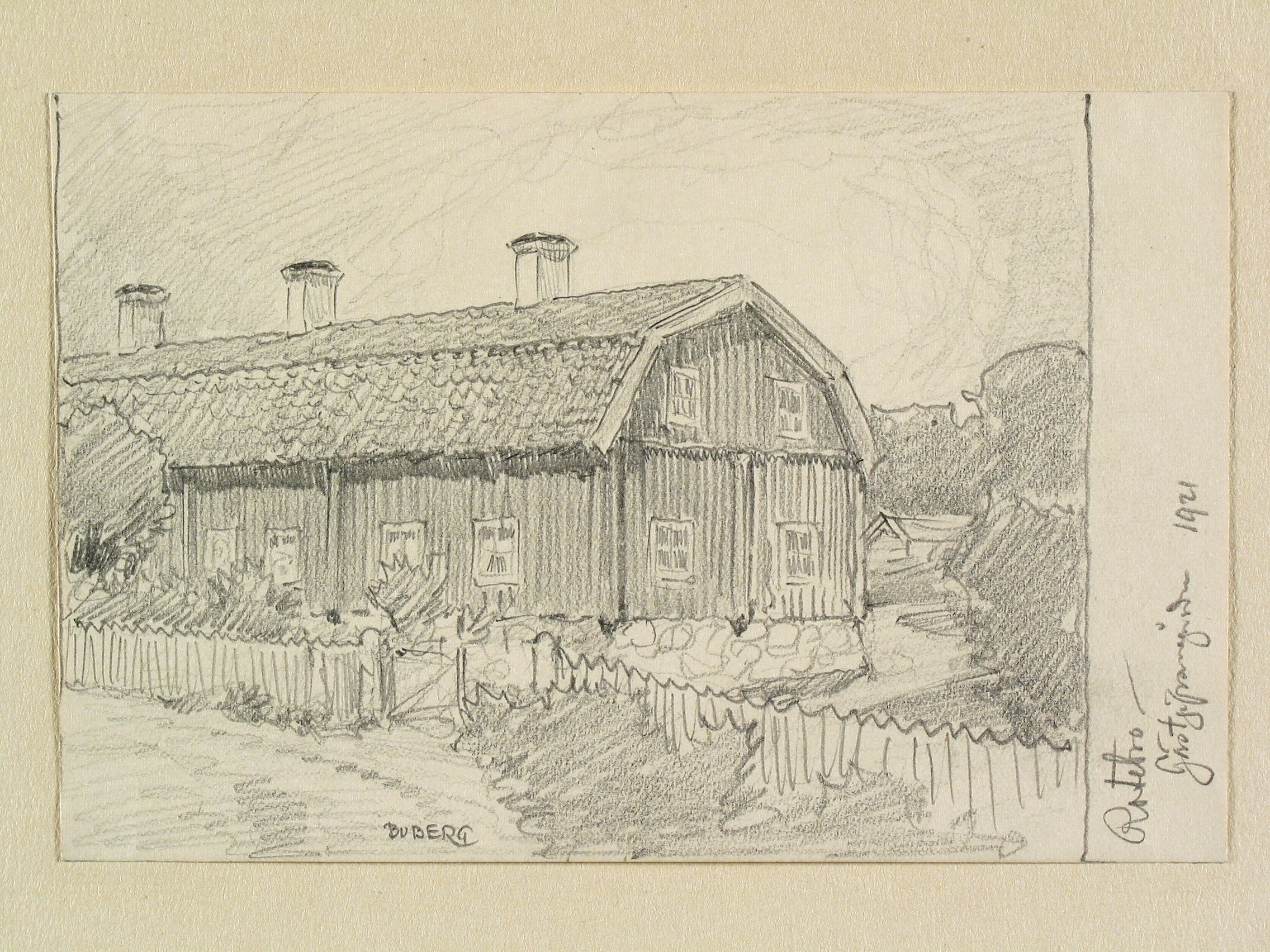 Uppland, Sollentuna hd., Sollentuna sn., Rotebro, Gästgivargården. Teckning av Ferdinand Boberg Depicted place: Sollentuna (Härad), Rotebro (Ort), Gästgivargården (Ortnamn därutöver), Sollentuna Parish (Q10673274)